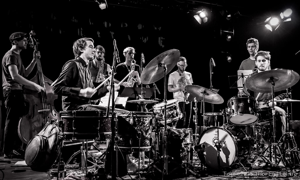 Foto: Thor Egil Leirtrø